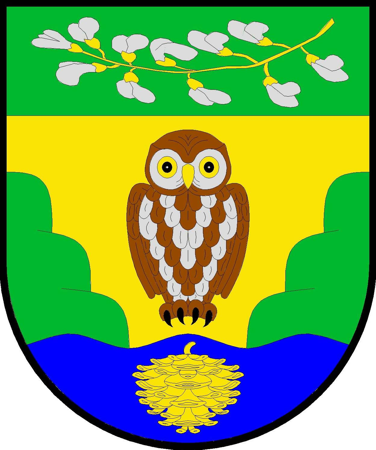 Znak obce Lhotky v okrese Mělník.